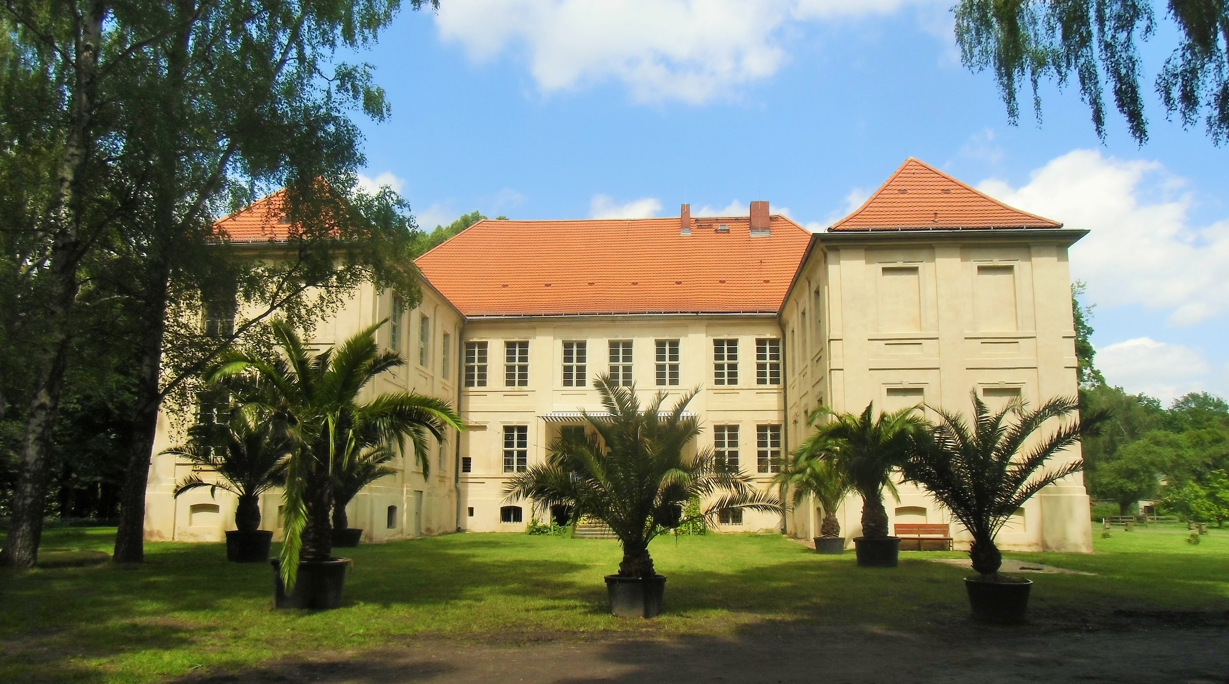 Denkmalgeschütztes Gutshaus beziehungsweise Schloss von Schwante, erbaut 1741 bis 1743